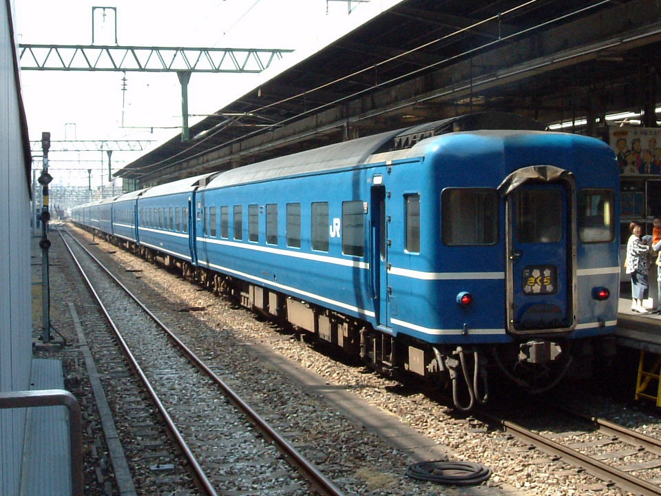 下り寝台特急「さくら」（14系客車使用）博多駅にて撮影